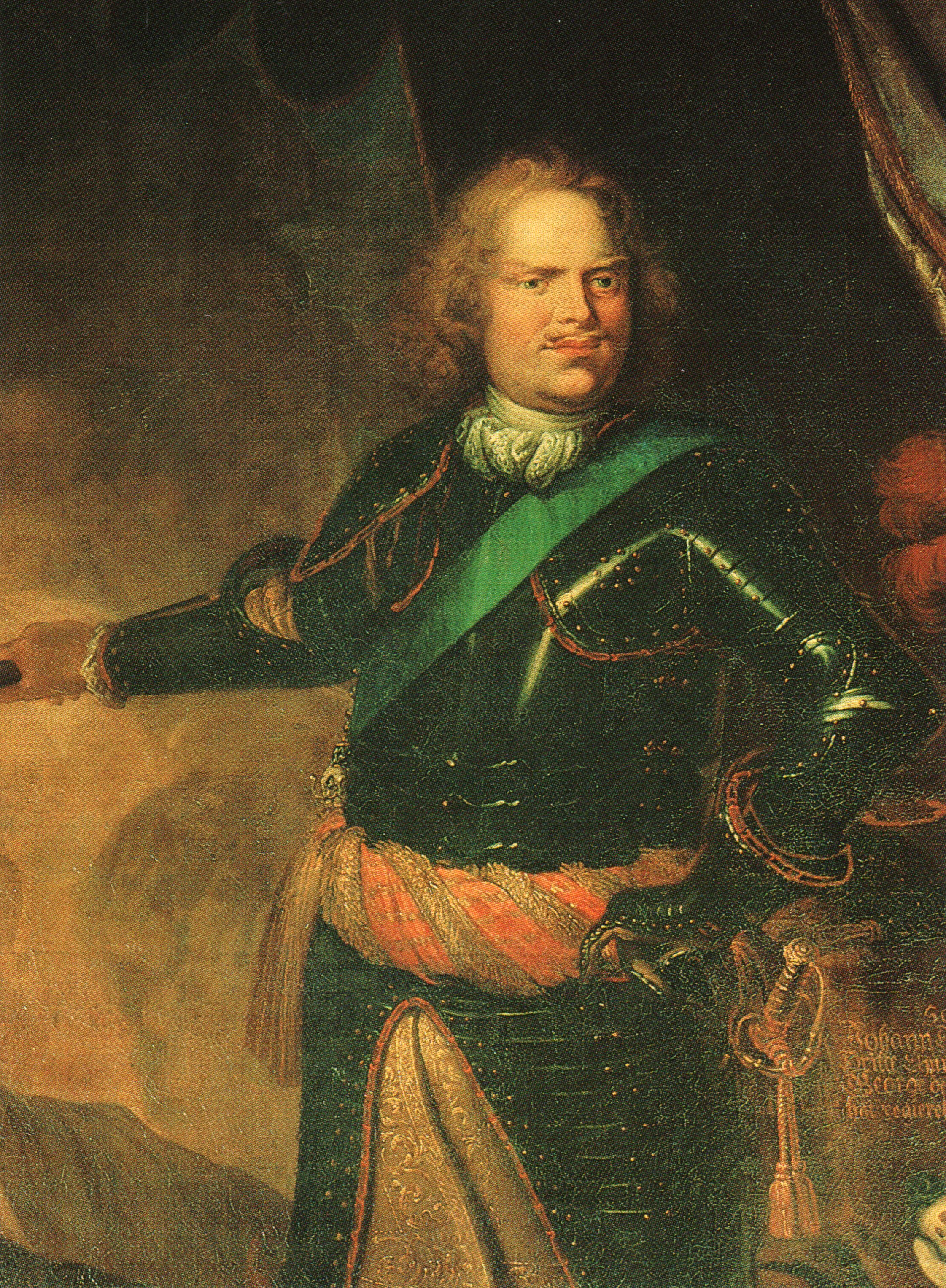 Porträt Kurfürst Johann Georg III. von Sachsen (reg. 1680–1691)